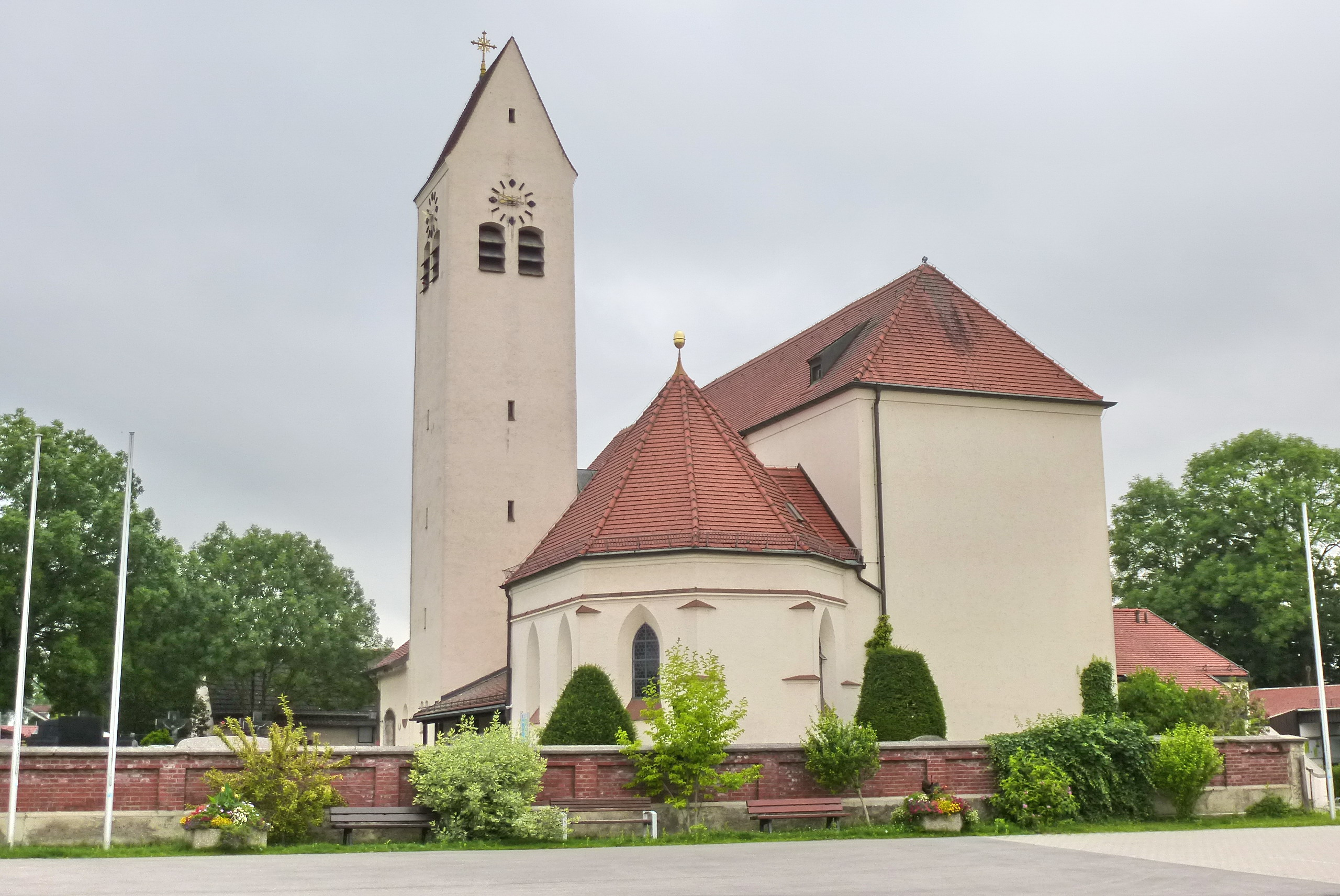 Aschheim, katholische St.Peter und Paul-Kirche